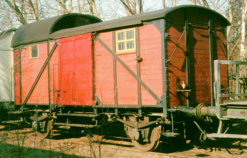 Güterzugbegleitwagen Pwg Hannover 121370, Baujahr 1923 bei Waggonfabrik Heine und Holländer, Elze. Lokpark Braunschweig, 1996.